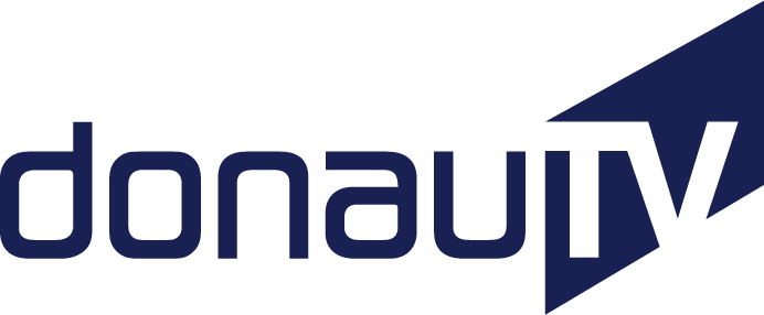 Logo des Senders Donau TV